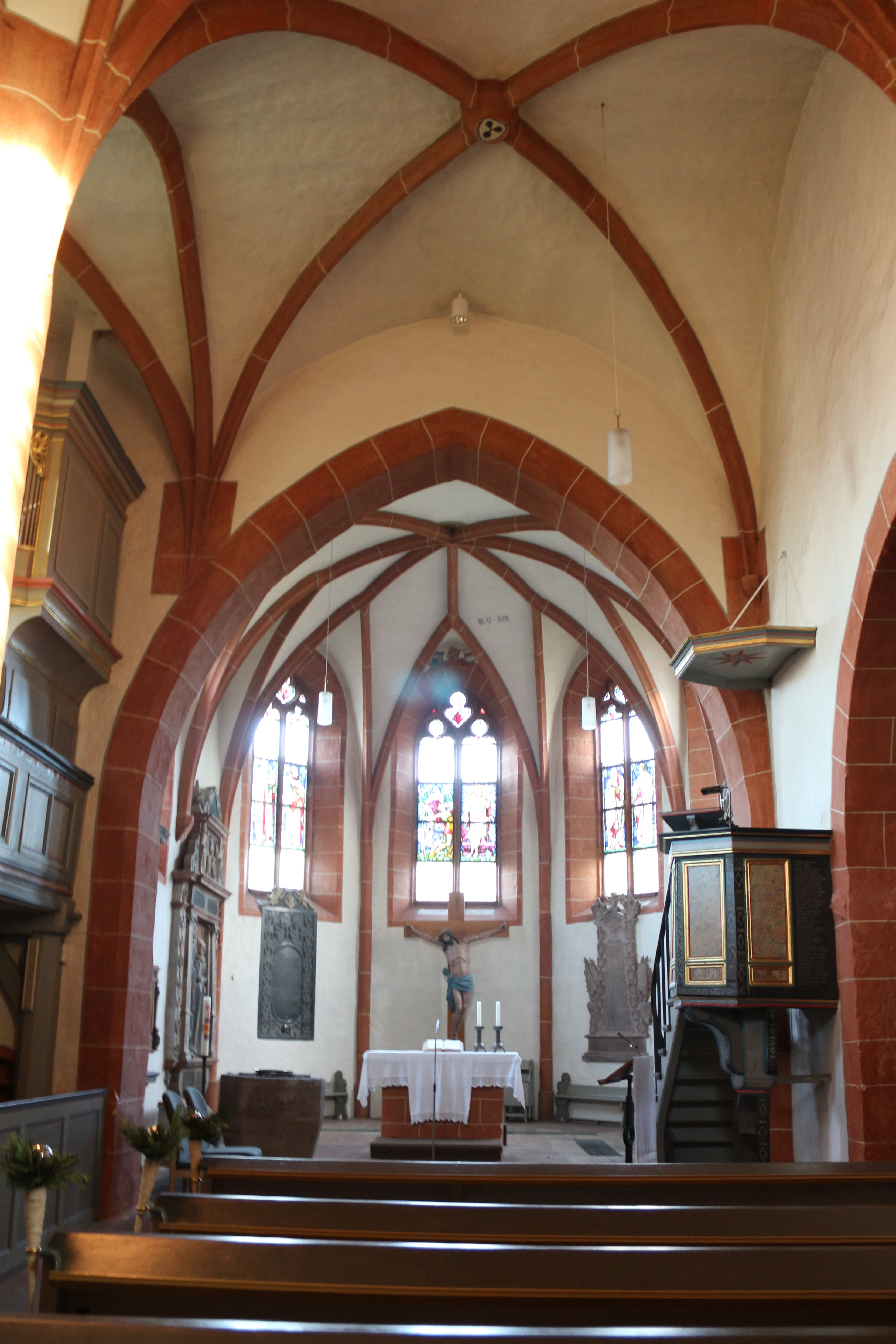 Evangelische Kirche Kirchberg (Lahn)